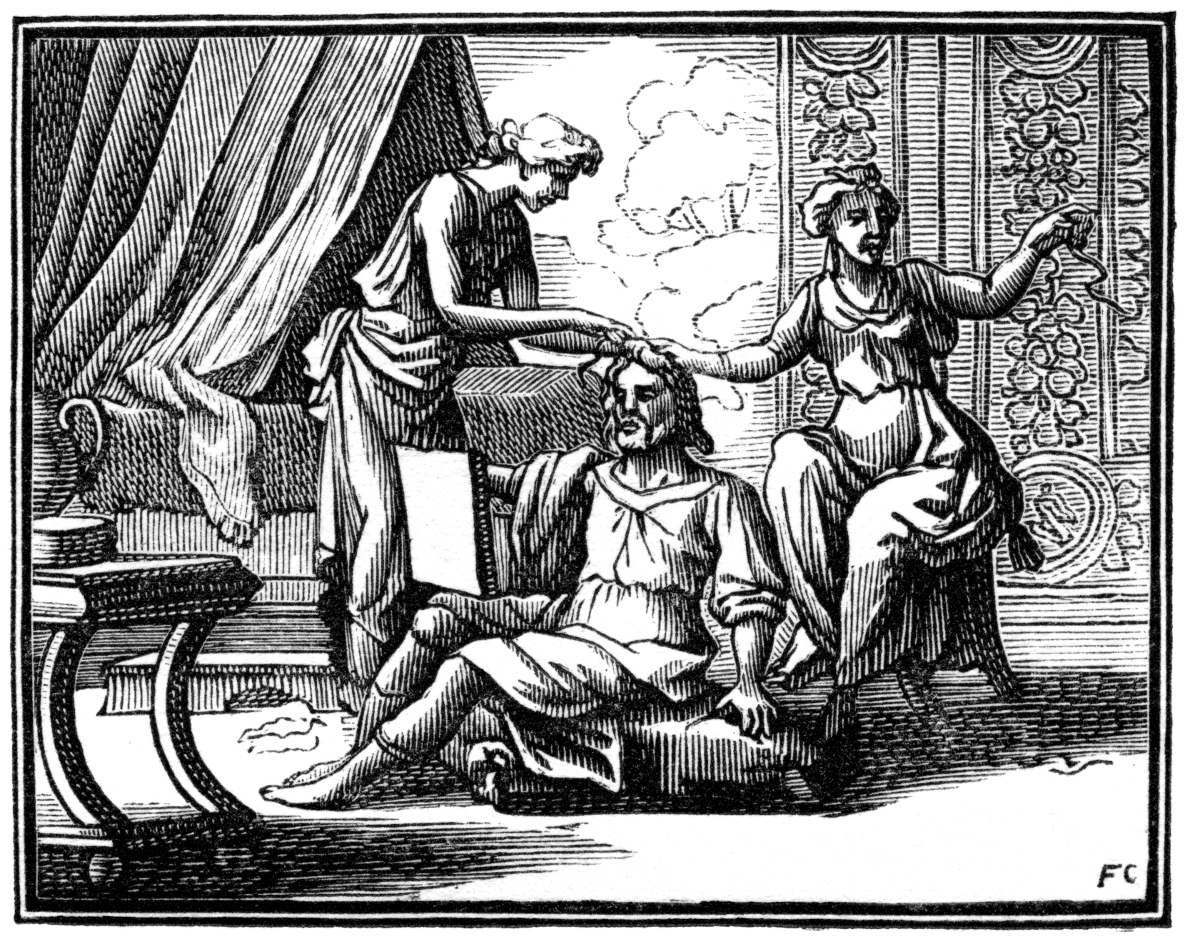 Illustrations pour les « Fables choisies mises en vers par M. de la Fontaine », Claude Barbin et Denys Thierry, Paris, 1668 (premier recueil) 1678-79 (deuxième recueil) 1694 (troisième recueil). Numérotation Charpentier (1705).